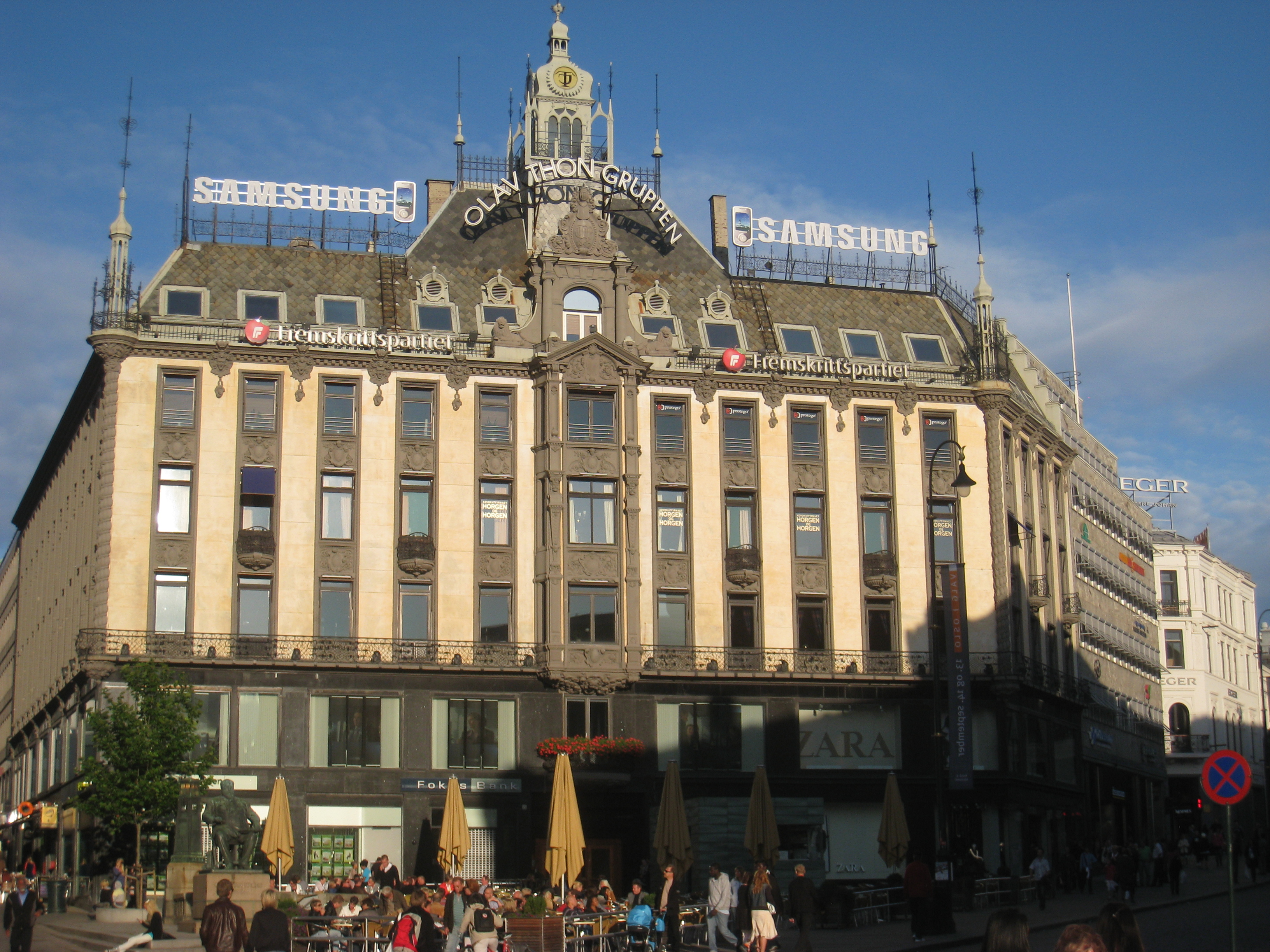 Tostrupgården, Oslo, Norway.